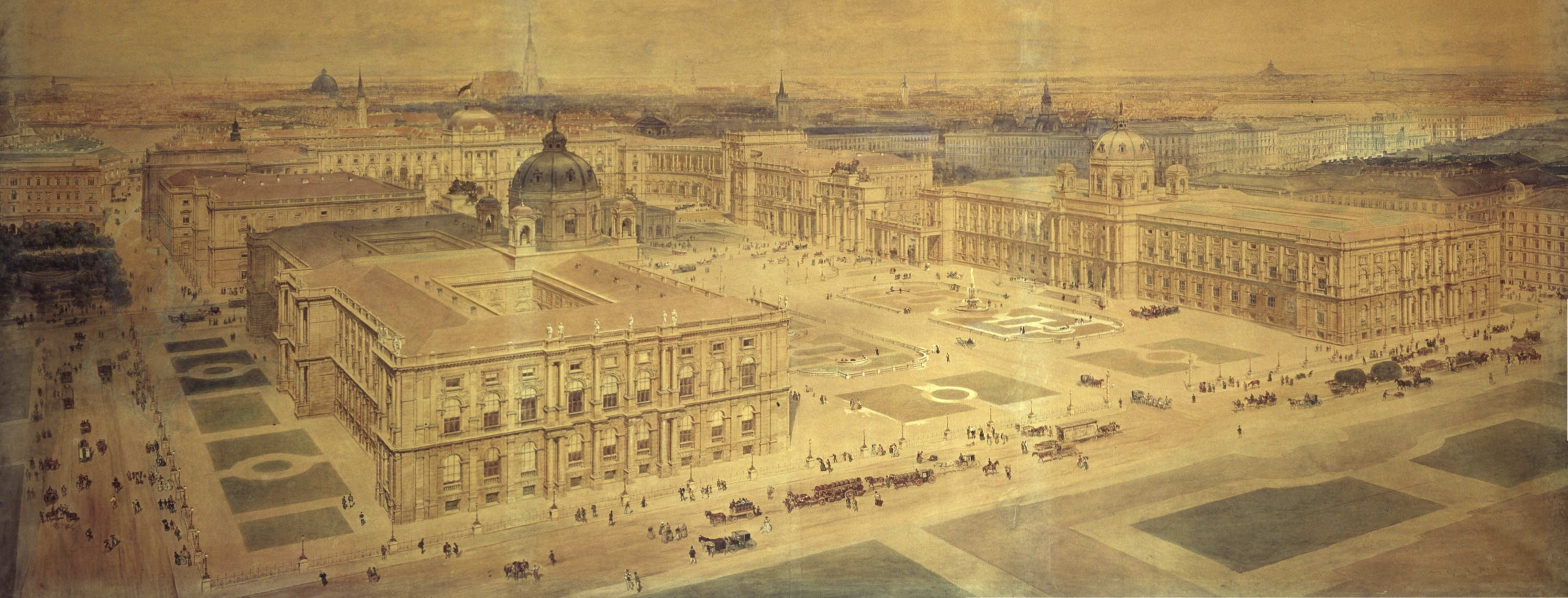 Kaiserforum